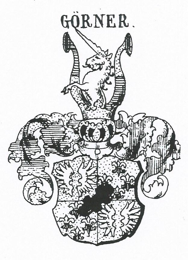 Georg August von Görner, Advokat in Breslau, in Wien am 18. Juli 1697 von Kaiser Leopold geadelt, Prädikat " von Gerner" und rotes Wachssiegel, aus Siebmacher Band VI., 8. II. Nürnberg 1890. Abgestorbener Preuss. Adel, Provinz Schlesien, Tafel 27.